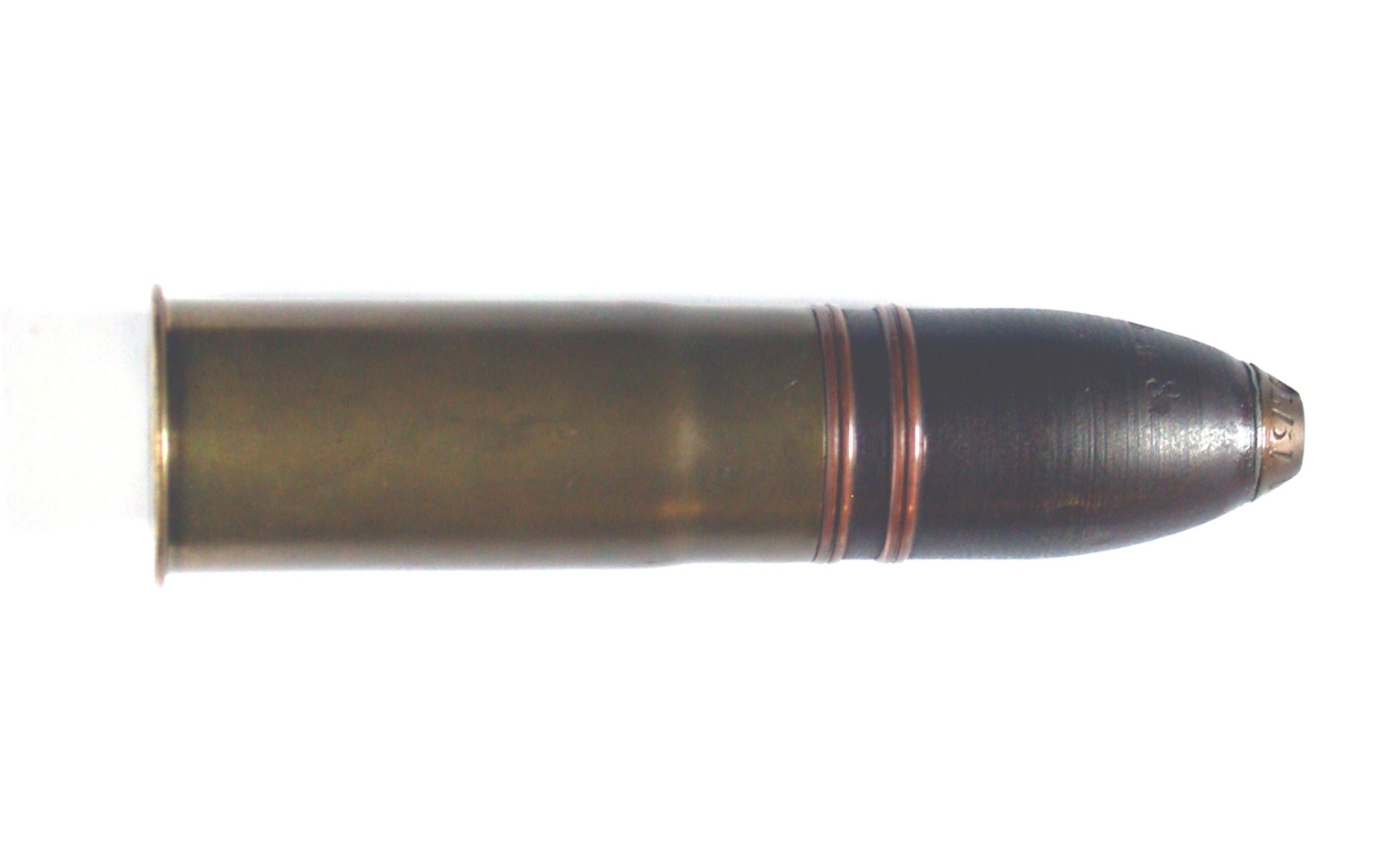 Hotchkiss 37 mm Patrone mit Explosivgeschoss